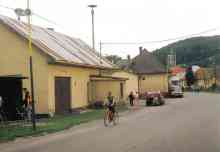 Popis: Centrum obce Zdroj: Fotodokumentácia k obci Dátum: 24.01.2006 Autor: Stanislav Rajňák Povolenie: PD Iné verzie tohto súboru: Nie